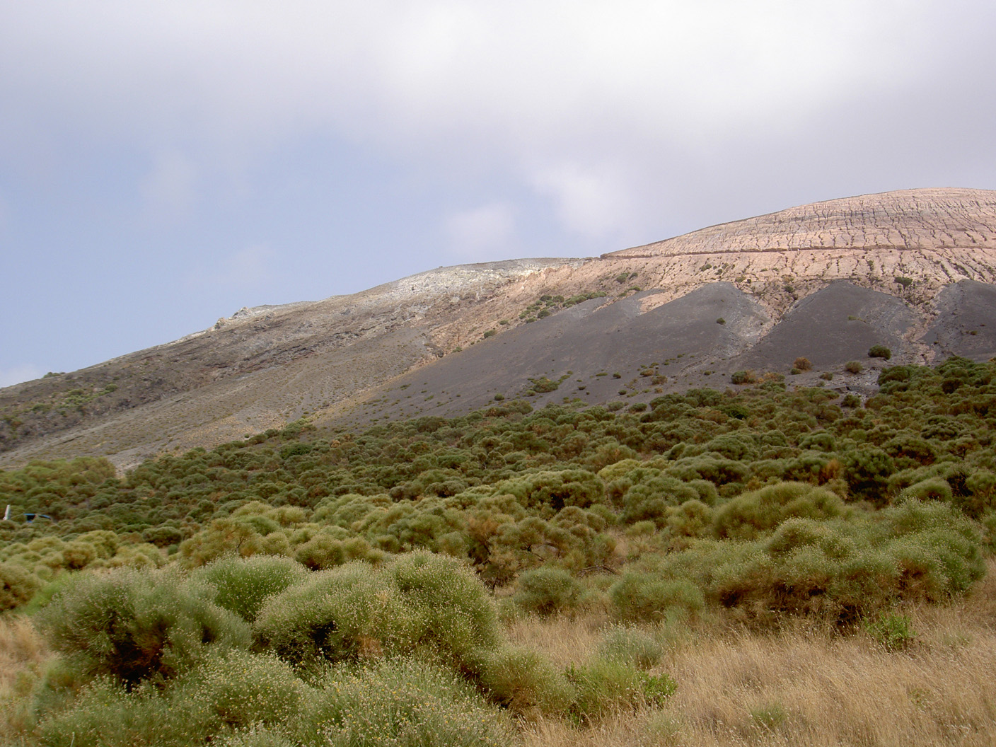 Vulcano, Sicily